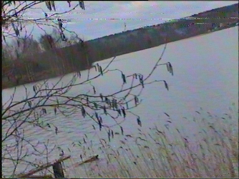 Запись с камеры формата Hi8